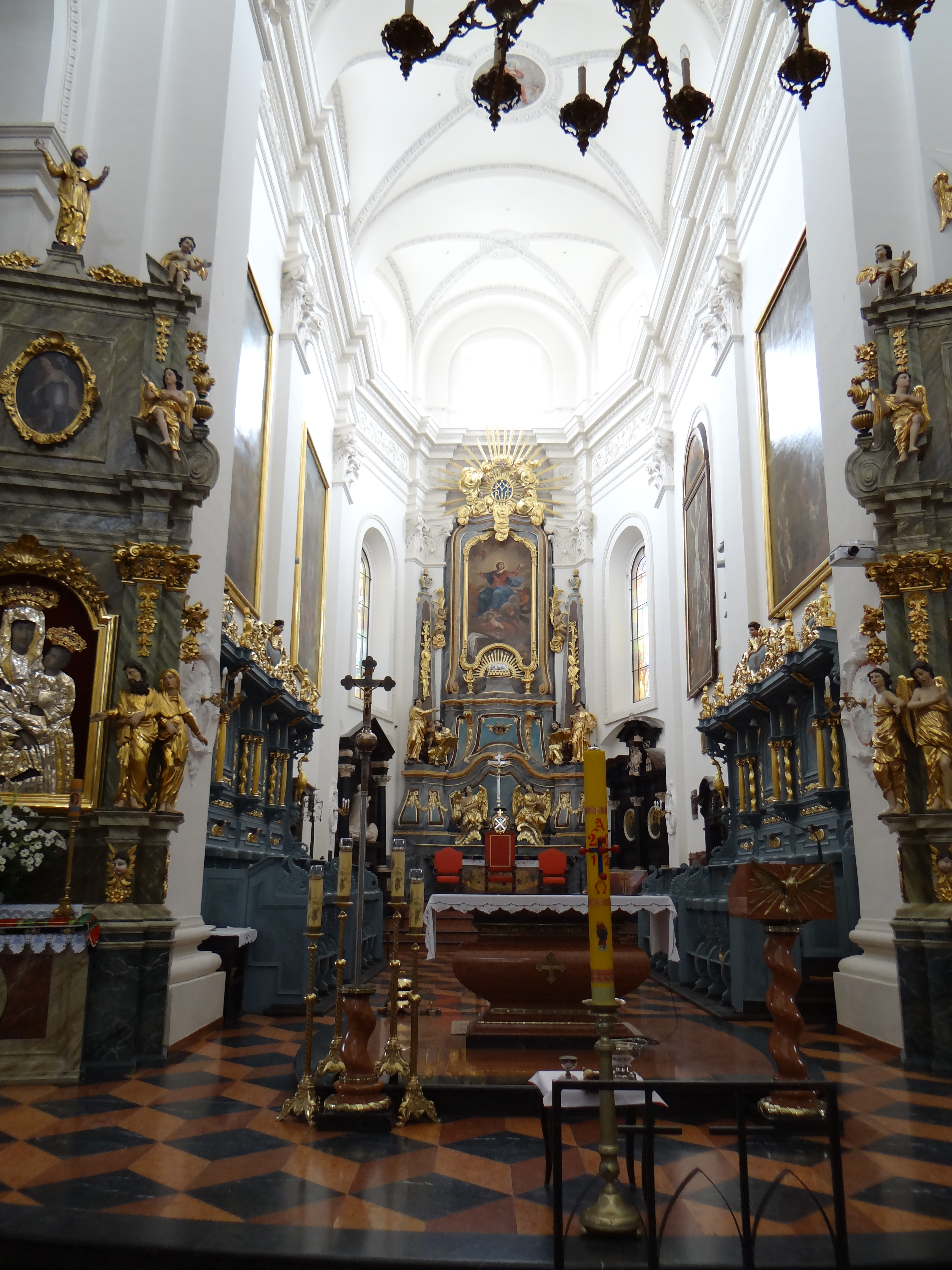 Bazylika Katedralna w Łowiczu - obecny ołtarz główny konsekrowano w 1765. Alternatywne źródła podają różnych jego projektantów, jednym z nich jest Jakub Fontana. Przyjęło się uznawać, ze jego projektantem był architekt Efraim Szreger (Schroeger). Wykonawcą drewnianej rzeźby i ozdób jest osiemnastowieczny, warszawski snycerz Jerzy Plesch. Centralne miejsce ołtarza wypełnia klasycystyczny obraz szkoły włoskiej "Wniebowzięcie NMP" . Ołtarz zwieńcza monogram "Maria" z złocistych obłokach i promieniach.